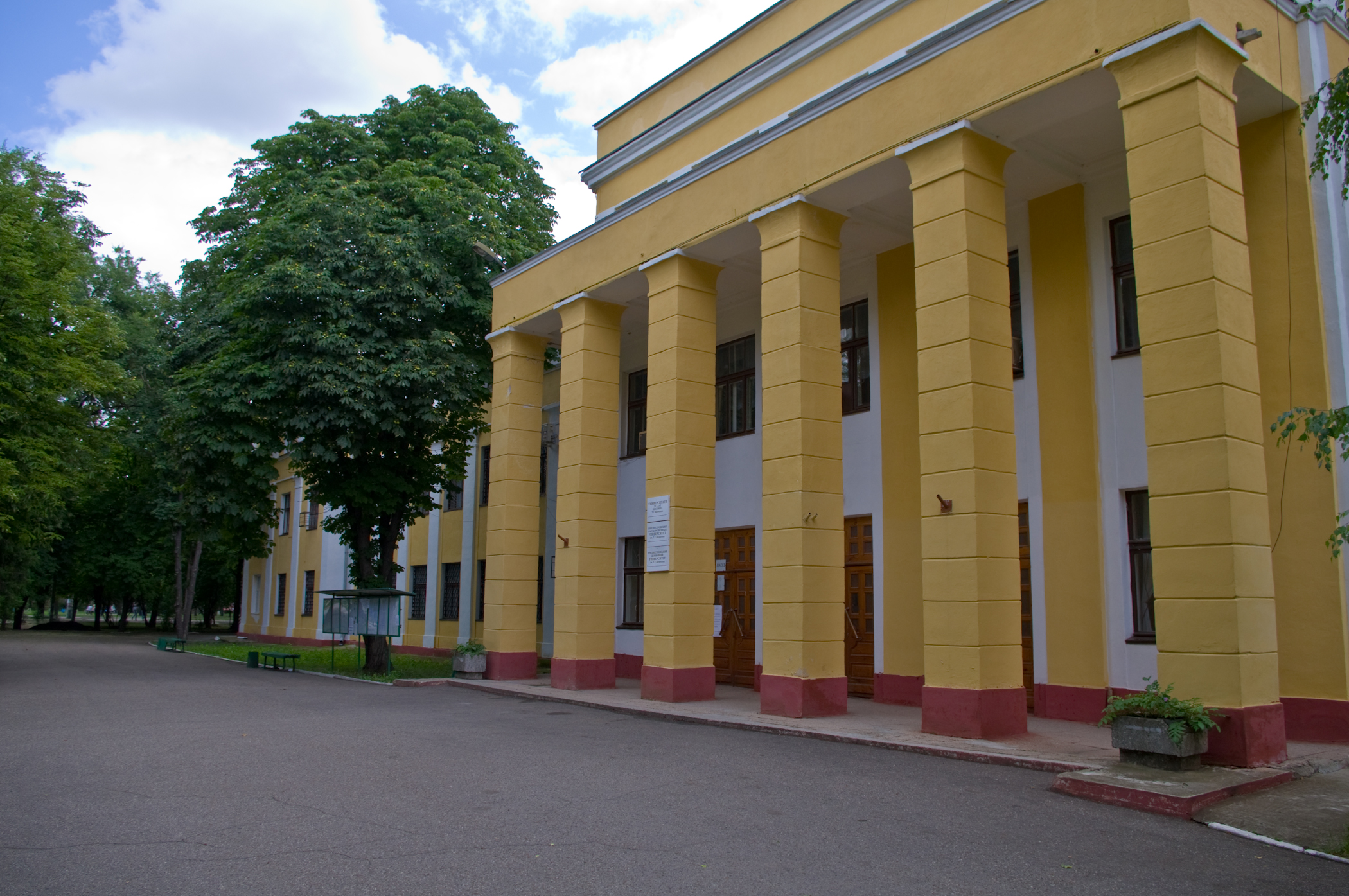 Приднестровский государственный университет летом, именно поэтому в кадре нет студентов.